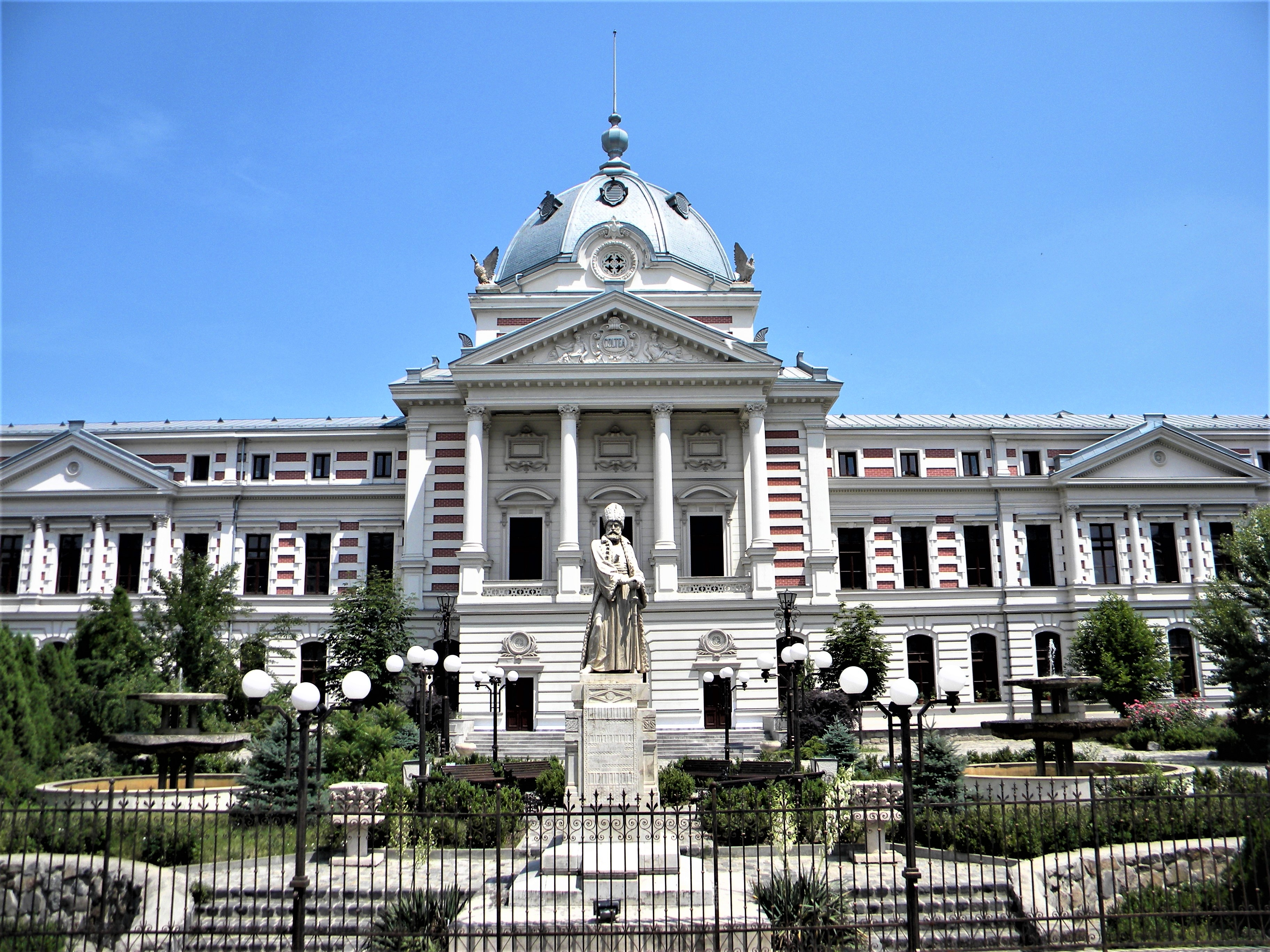 Bucuresti, Romania. SPITALUL COLTEA. A fost primul spital din Bucureşti, construit la 14 decembrie 1704, din iniţiativa spătarului Mihail Cantacuzino, pentru a fi un spital pentru săraci. Organizarea şi funcţionarea spitalului s-a făcut după modelul spitalului Ospedale di S. Lazzaro e Mendicanti din Veneţia. Spitalul Clinic Colţea este un spital din Bucureşti situat în sectorul 3 al municipiului. Unitate medicală cu tradiţie, spitalul a fost locul în care au profesat mari nume româneşti în domeniul medical precum Nicolae Creţulescu, cel care a pus aici bazele şcolii de microchirurgie. Spitalul Colţea a fost una din primele baze de învăţământ medical din România. 02